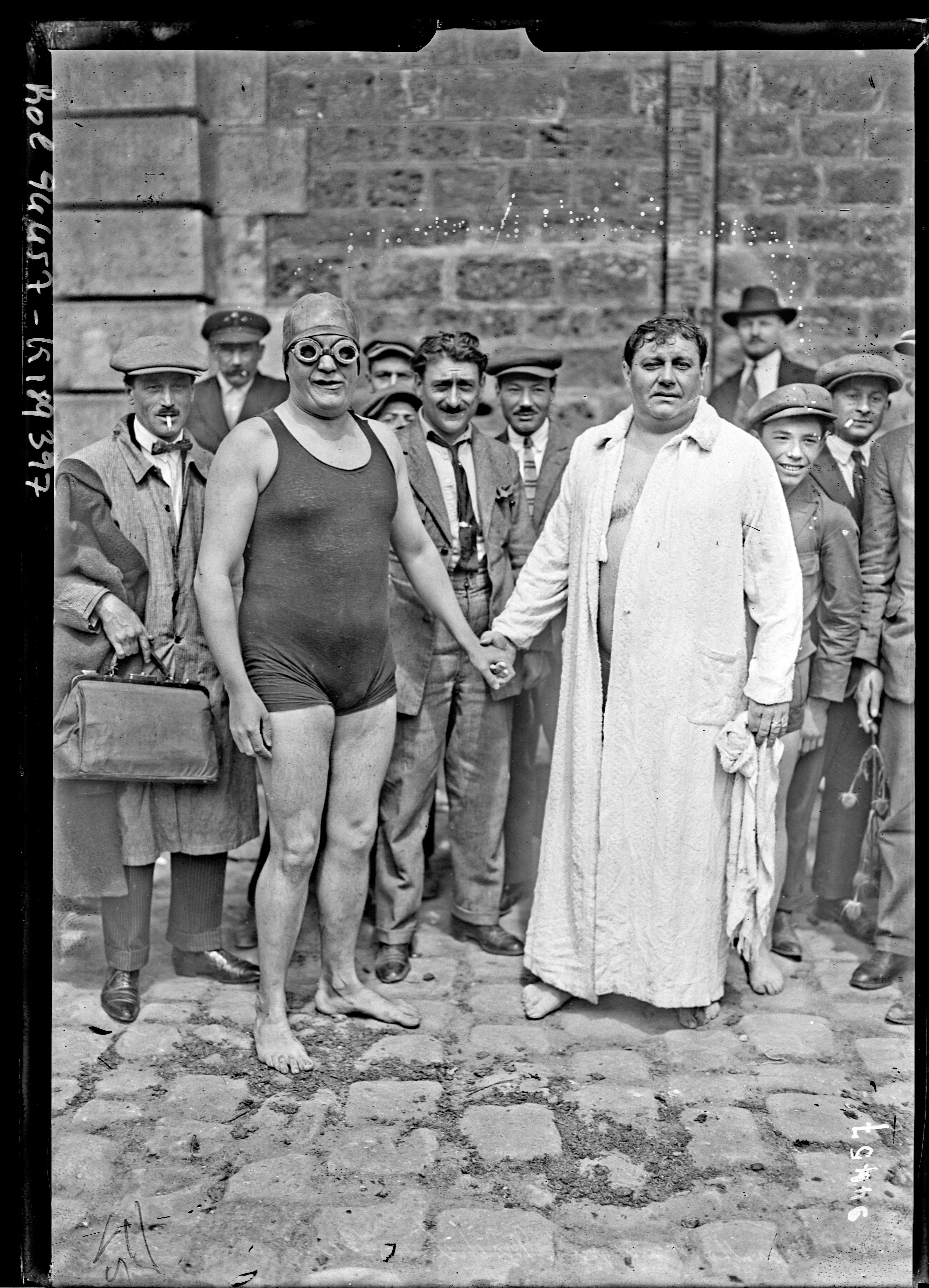 les nageurs georges michel et albert chrétien posent